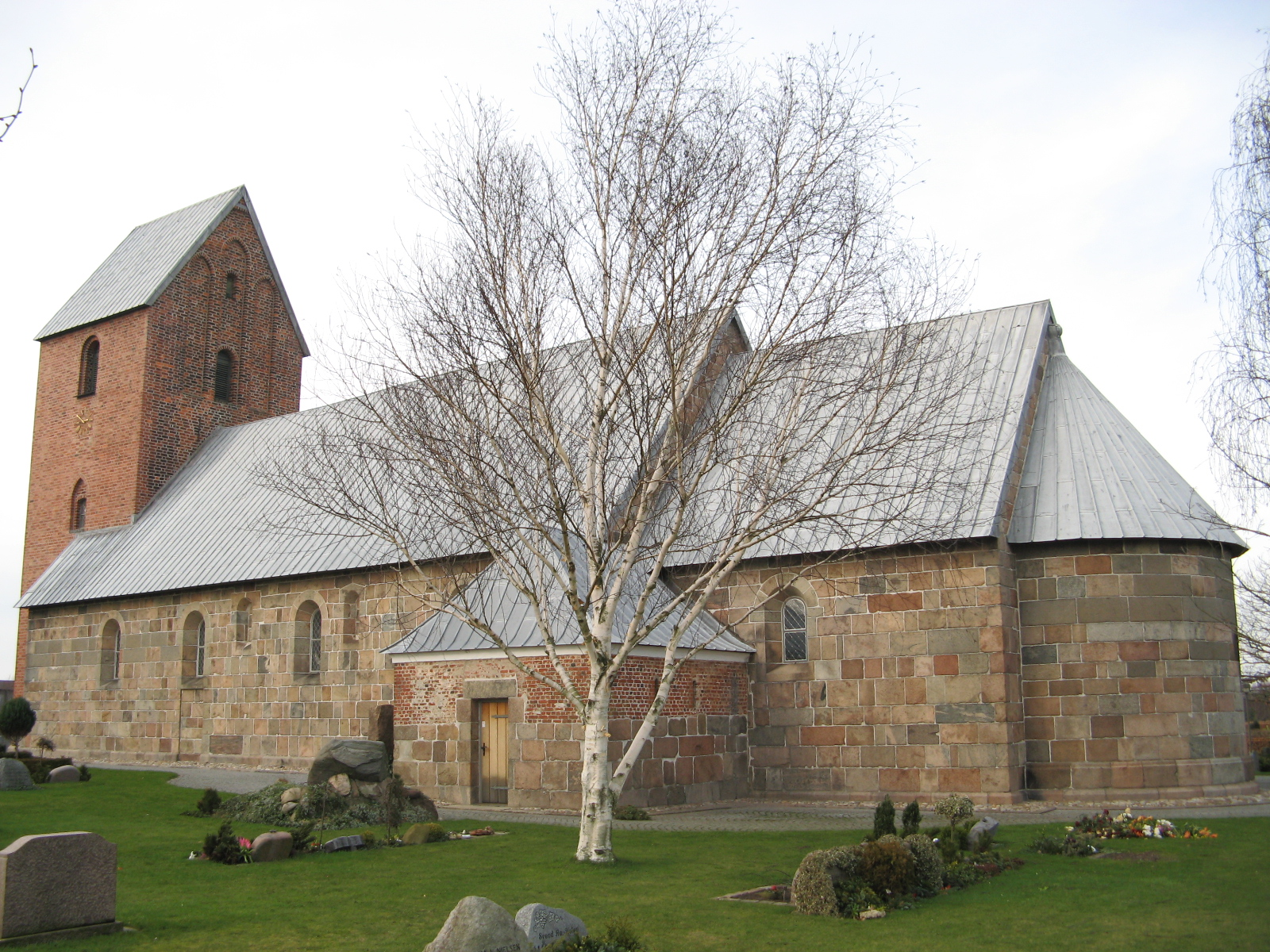 Jerne Kirke, Jerne sogn, Esbjerg kommune (former: Skads Herred, Ribe Amt). Kirken set fra sydøst.